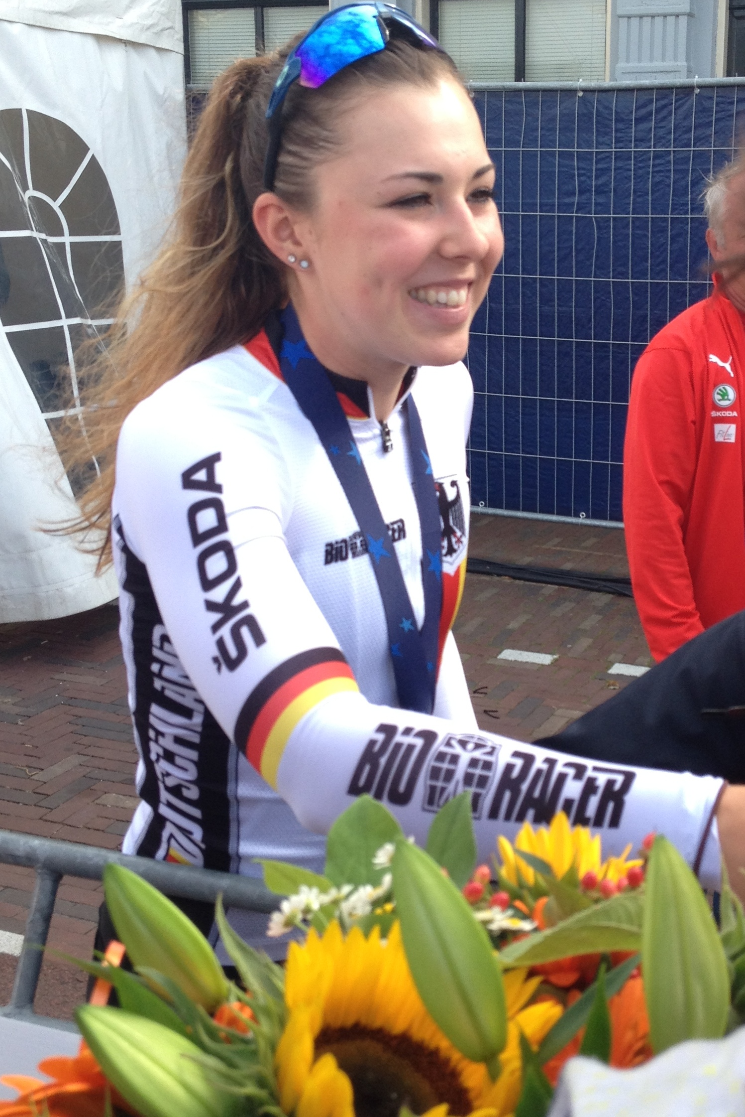 Wegwedstrijd voor vrouwen elite tijdens de Europese kampioenschappen wielrennen in Alkmaar op zaterdag 10 augustus 2019.